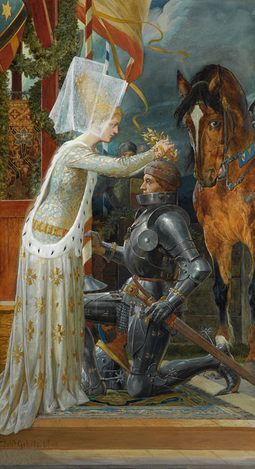 Johannes Gehrts (1855–1921): Ritter Ivanhoe, Gouache, 68 x 38 cm